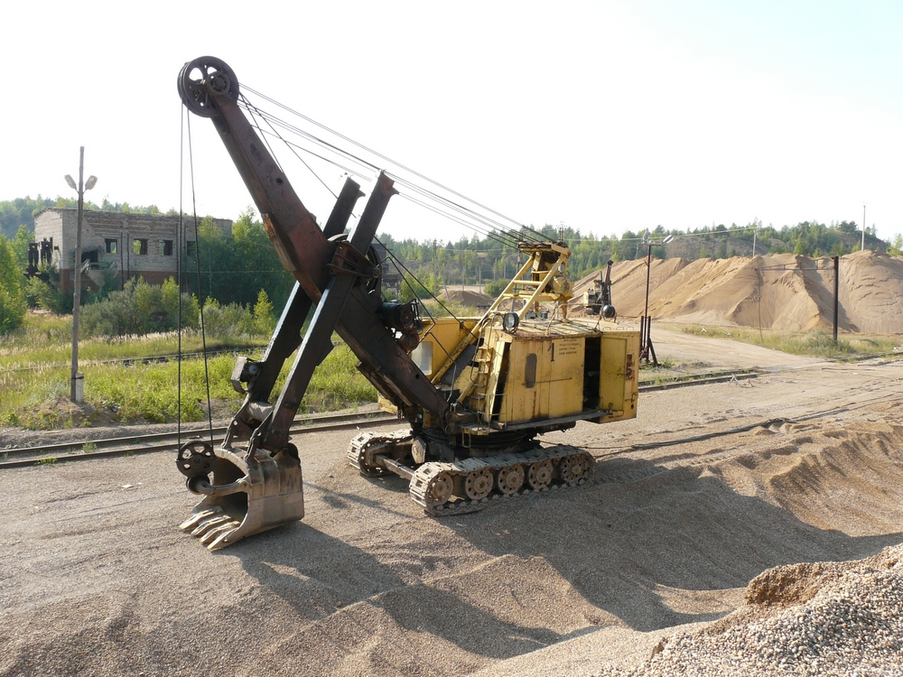 Карьерный экскаватор